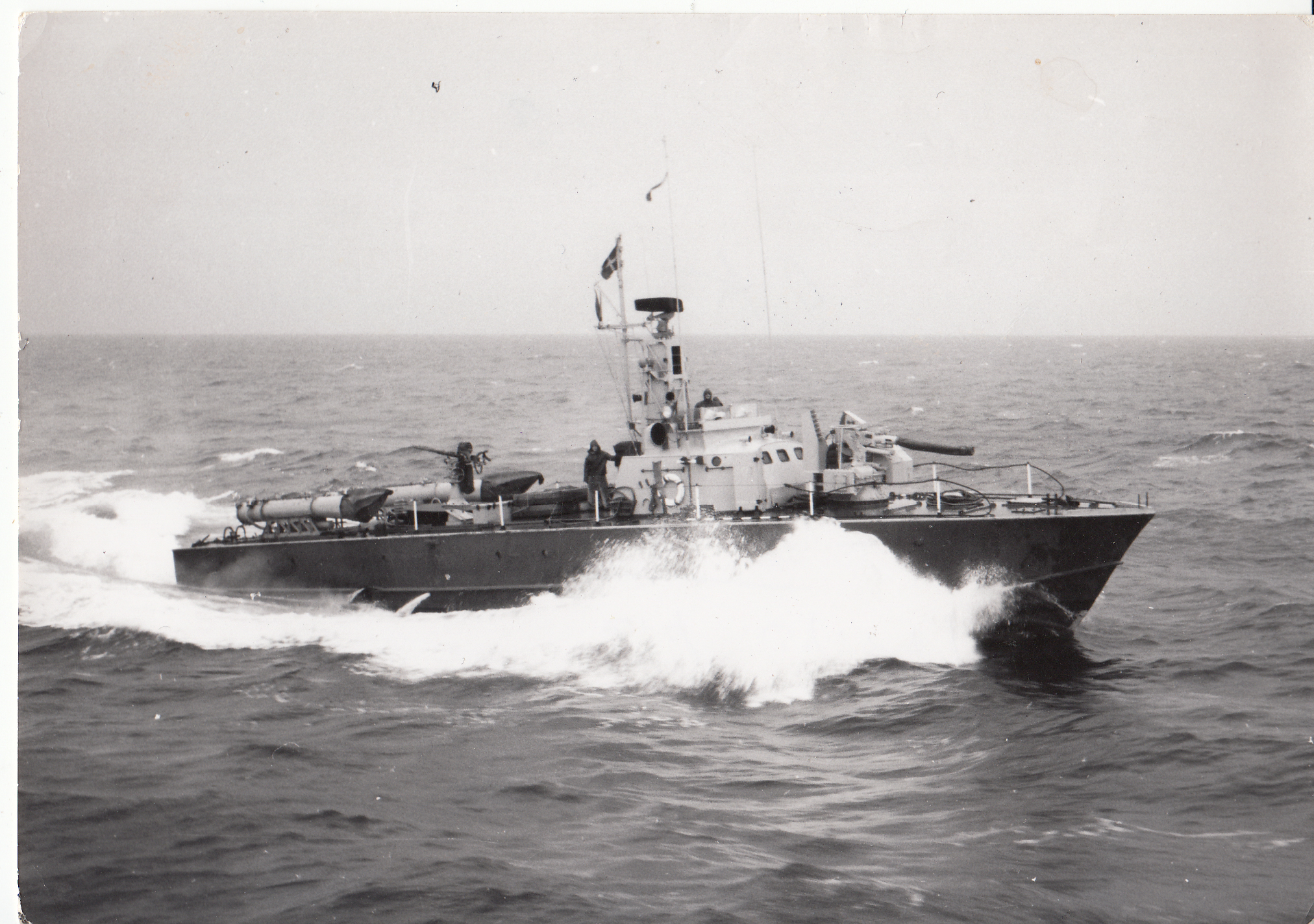 טרפדת חיל הים ט-206 תוצרת מאולן בצרפת, לאחר שיפוץ והתקנת מנועי דיזל, נושאת תותח בופורס 40 מ"מ בחרטום.